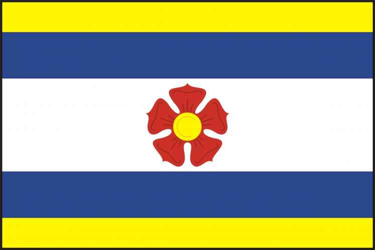 vlajka, Babice, okres Prachatice